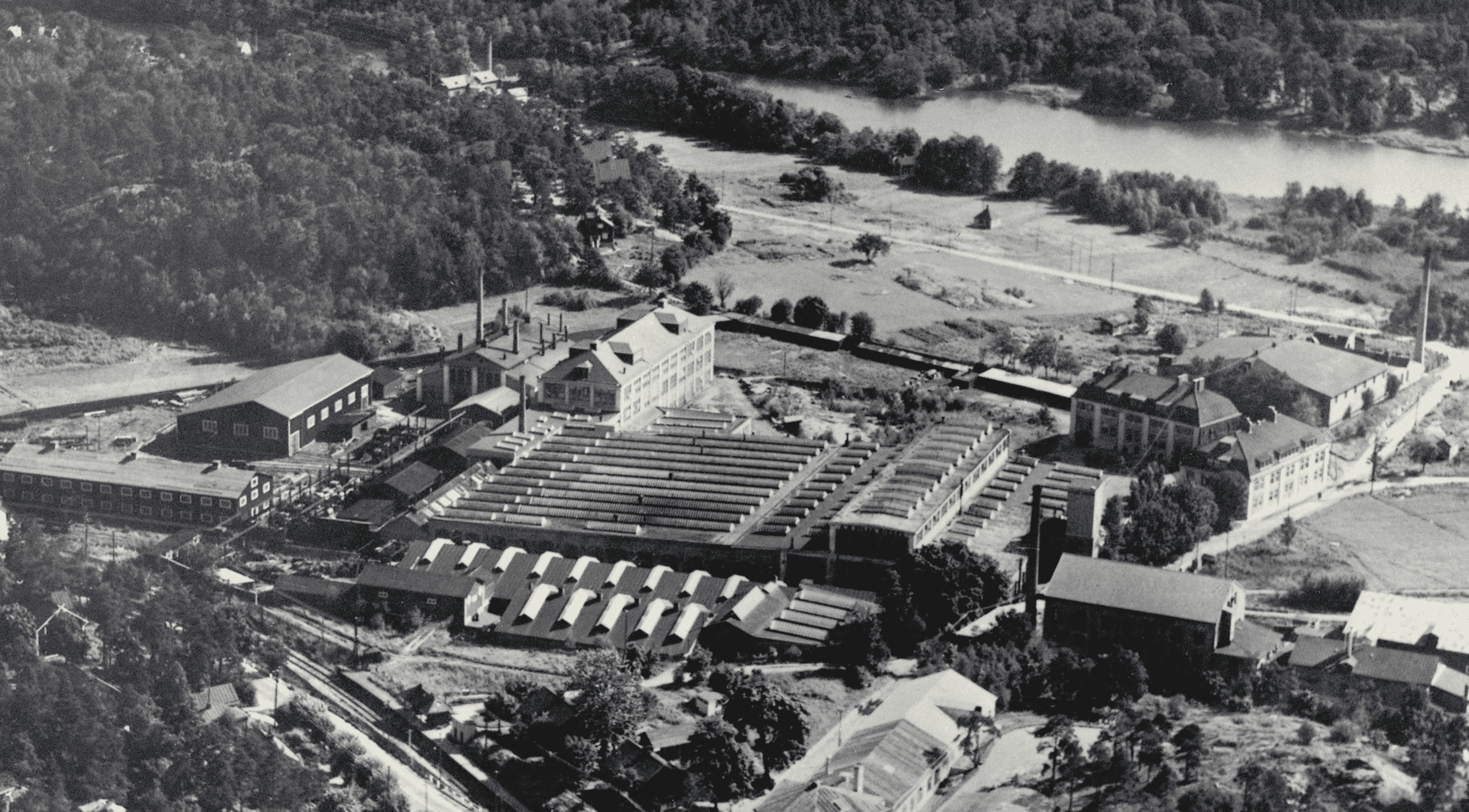 Diesels Motors fabriksanläggning, Sickla